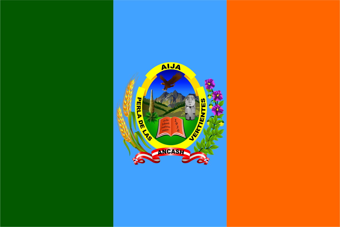 Distrito de Aija - Provincia de Aija - Región Ancash